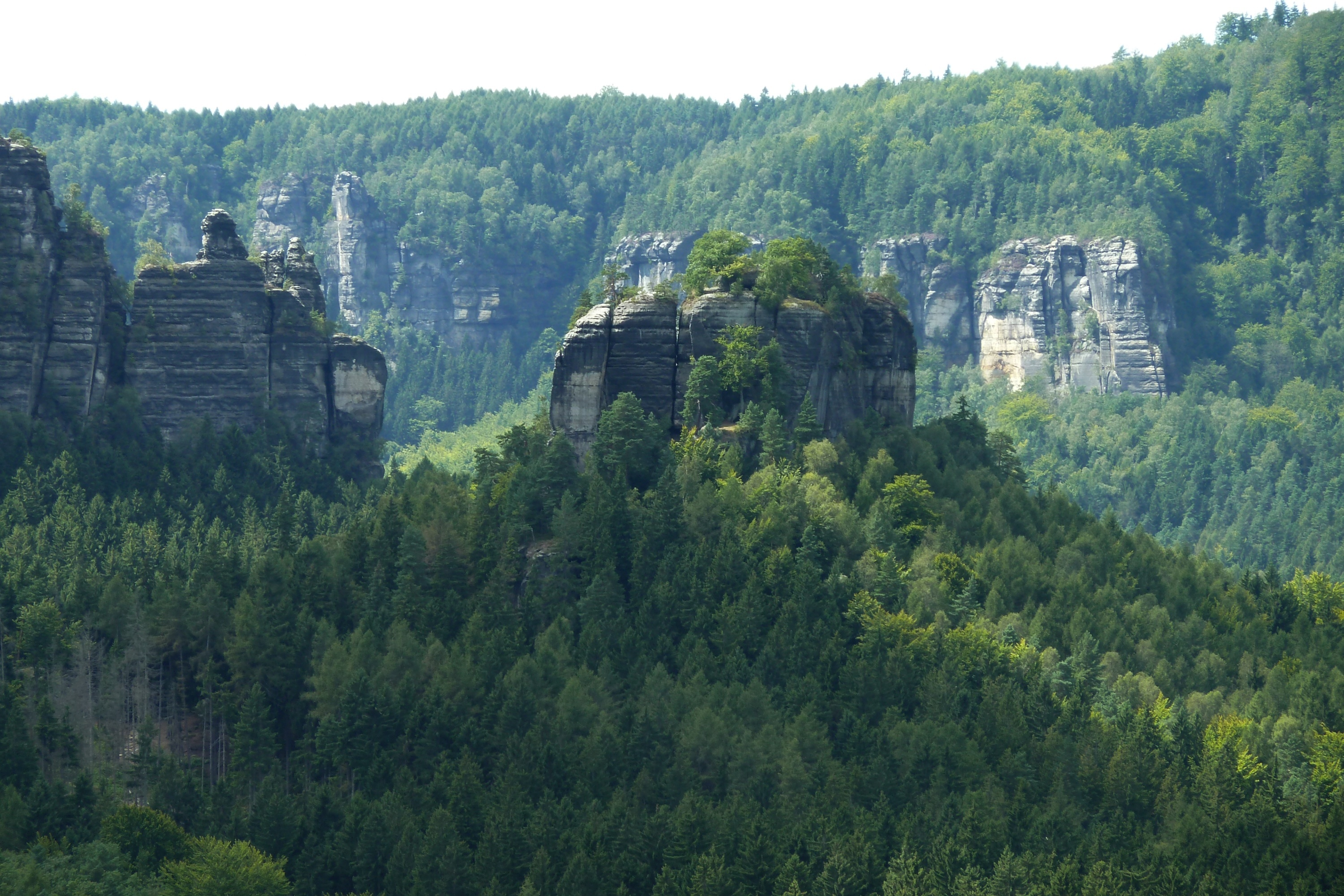 Winterstein in der Sächsischen Schweiz